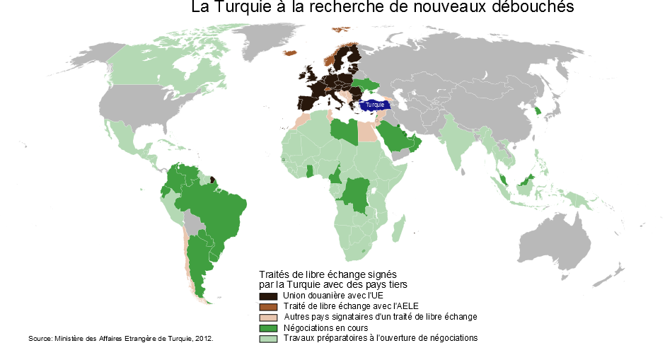 Carte des traités de libre échange signés par la Turquie